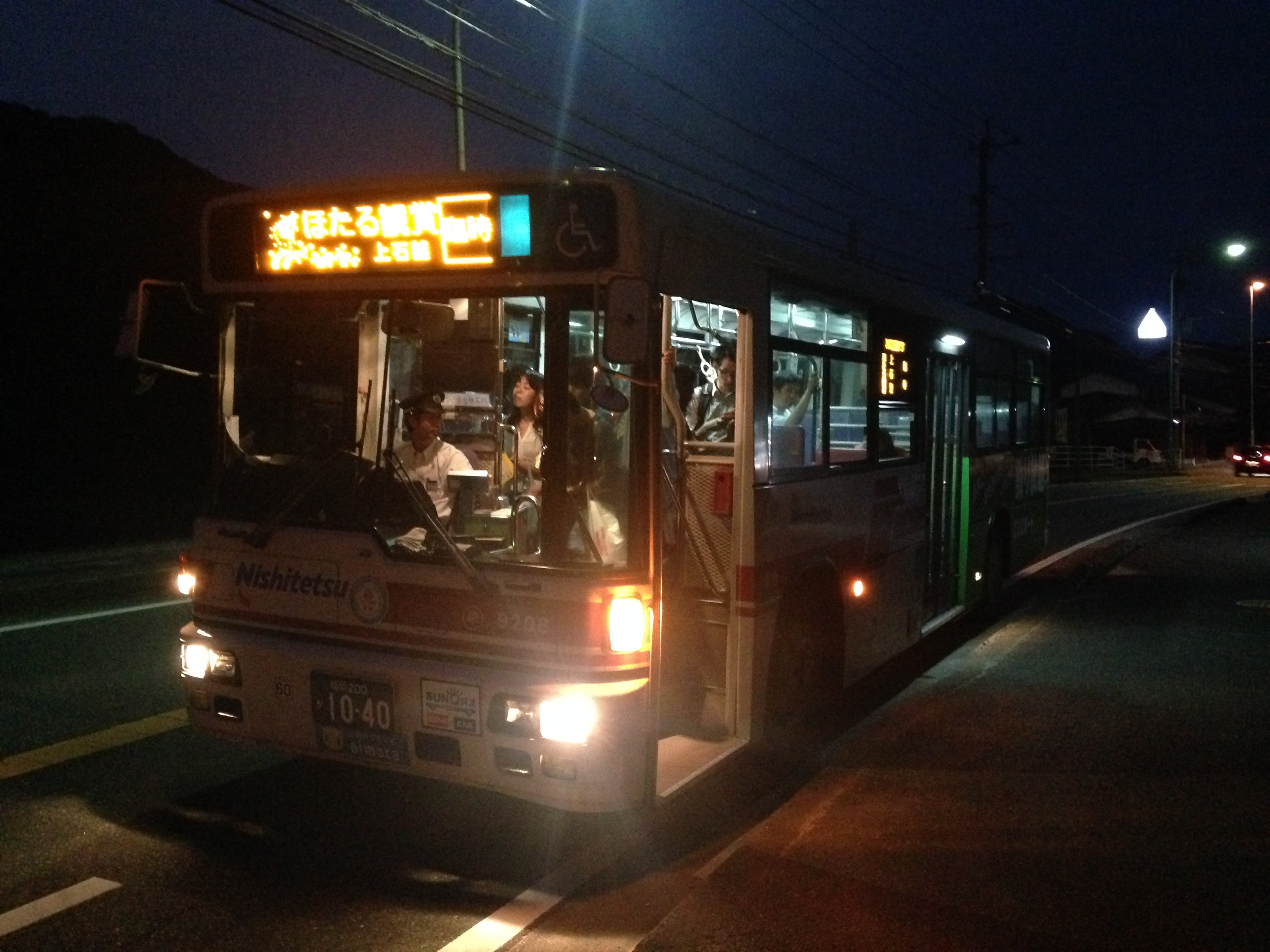 福岡県福岡市早良区石釜付近の西鉄ホタル鑑賞臨時バス